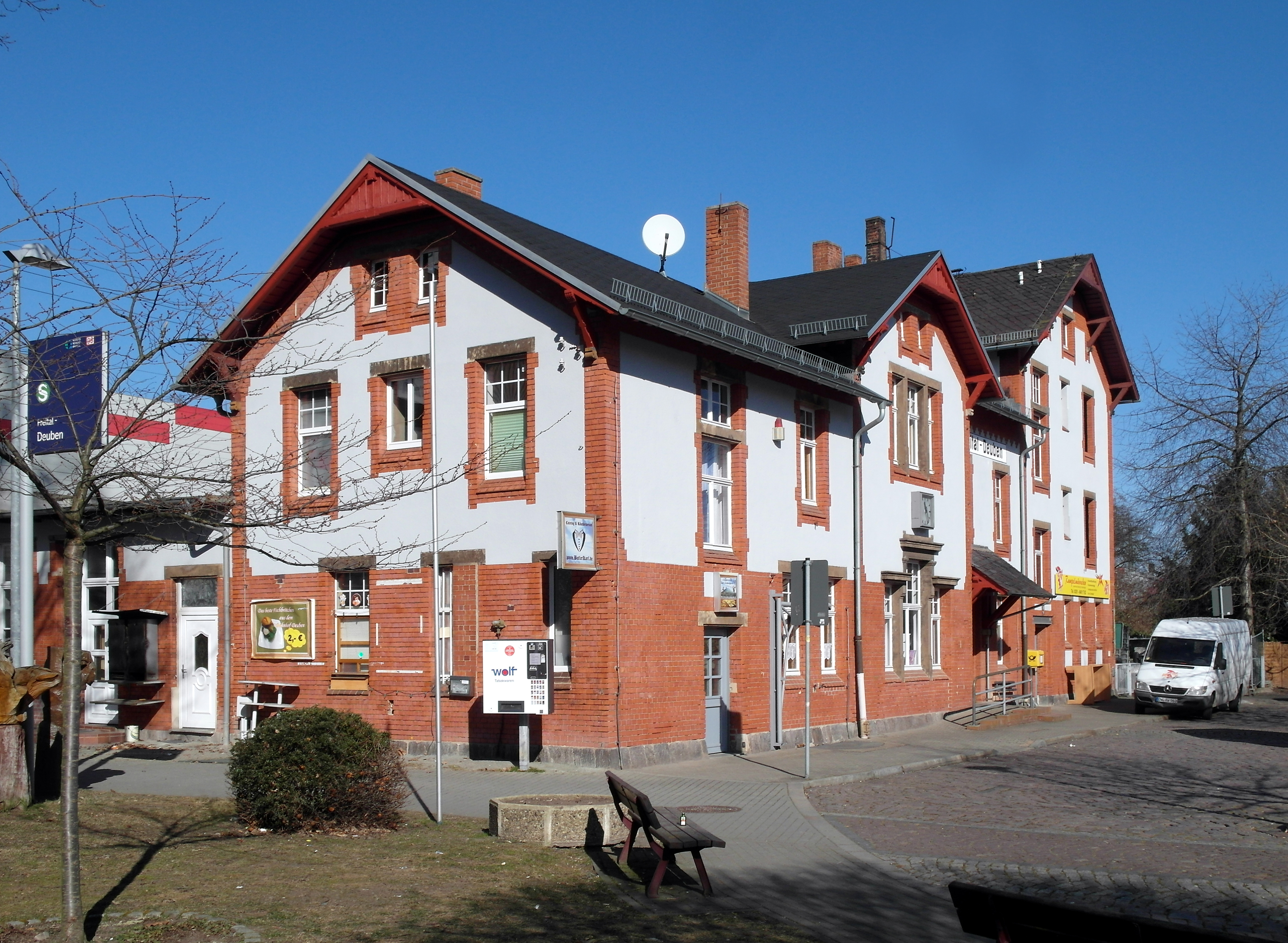 25.02.2018 01705 Freital-Deuben, Bahnhofstraße 23 (GMP: 50.999269,13.646816): Bahnhof Freital-Deuben an der Sachsenmagistrale Dresden - Werdau und dem S-Bahnnetz Dresden. [SAM4349.JPG]20180225200DR.JPG(c)Blobelt